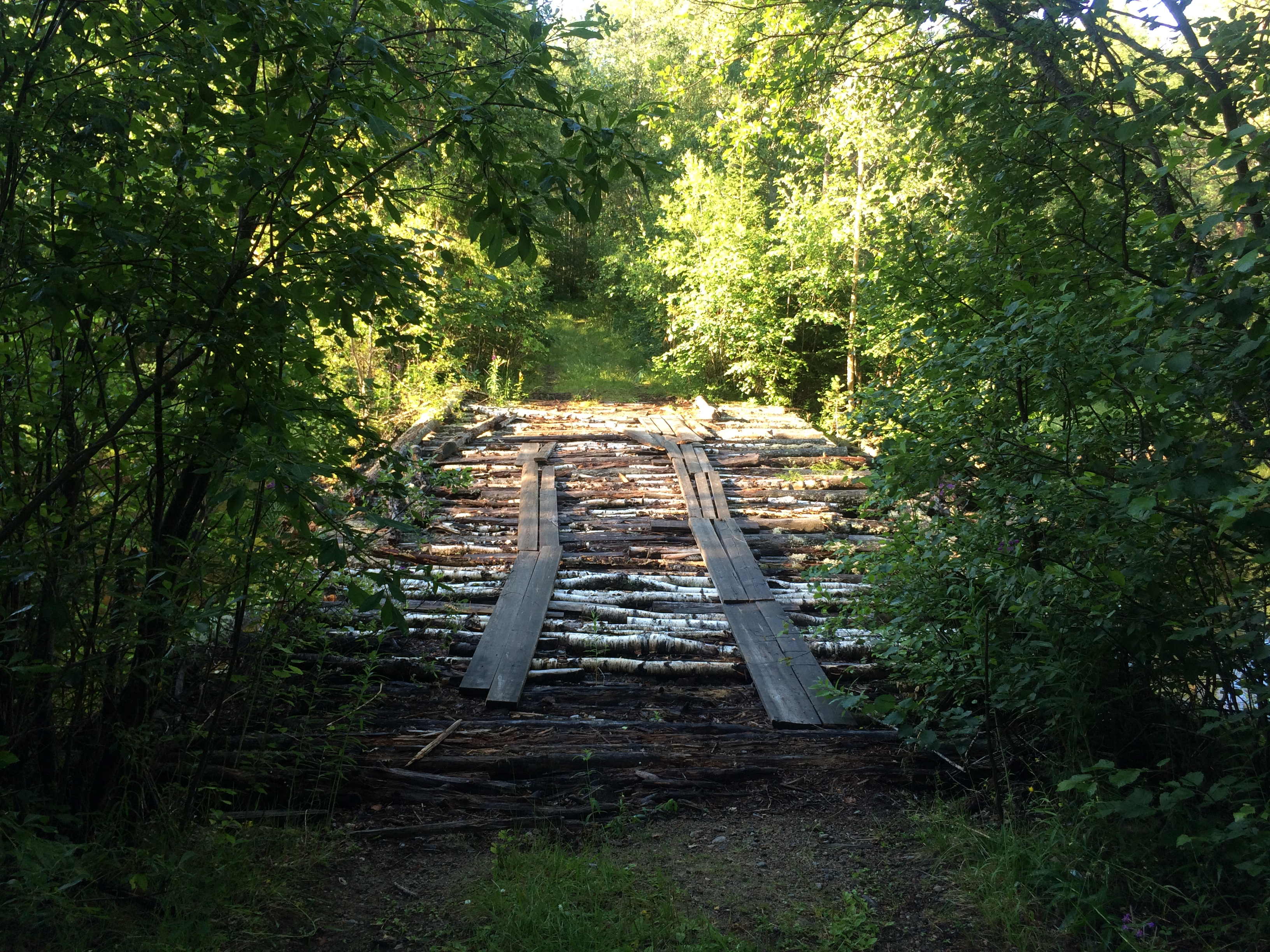 Ирста